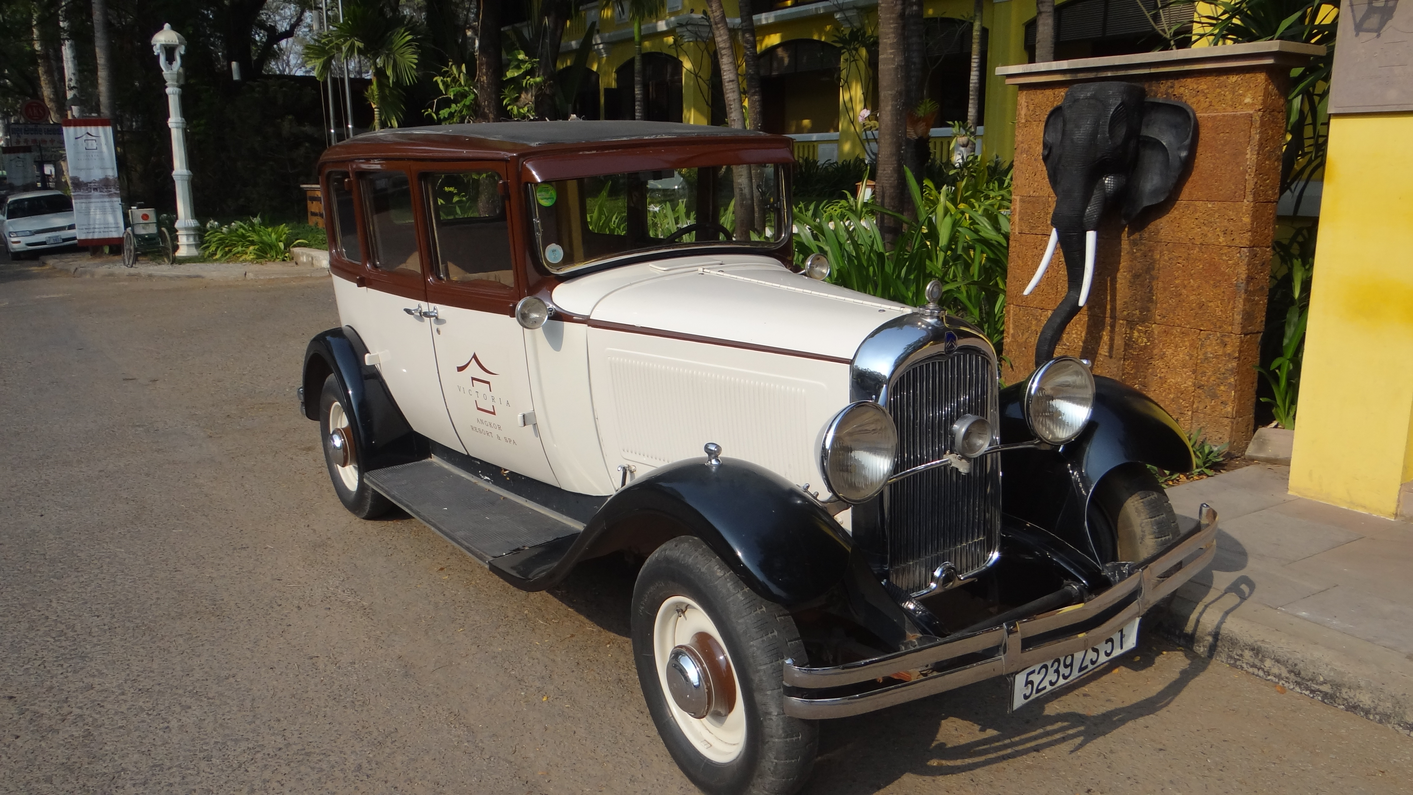 Citroen C (1928) à Siem Reap au cambodge en provenance de Saint-Python Département du Nord en France